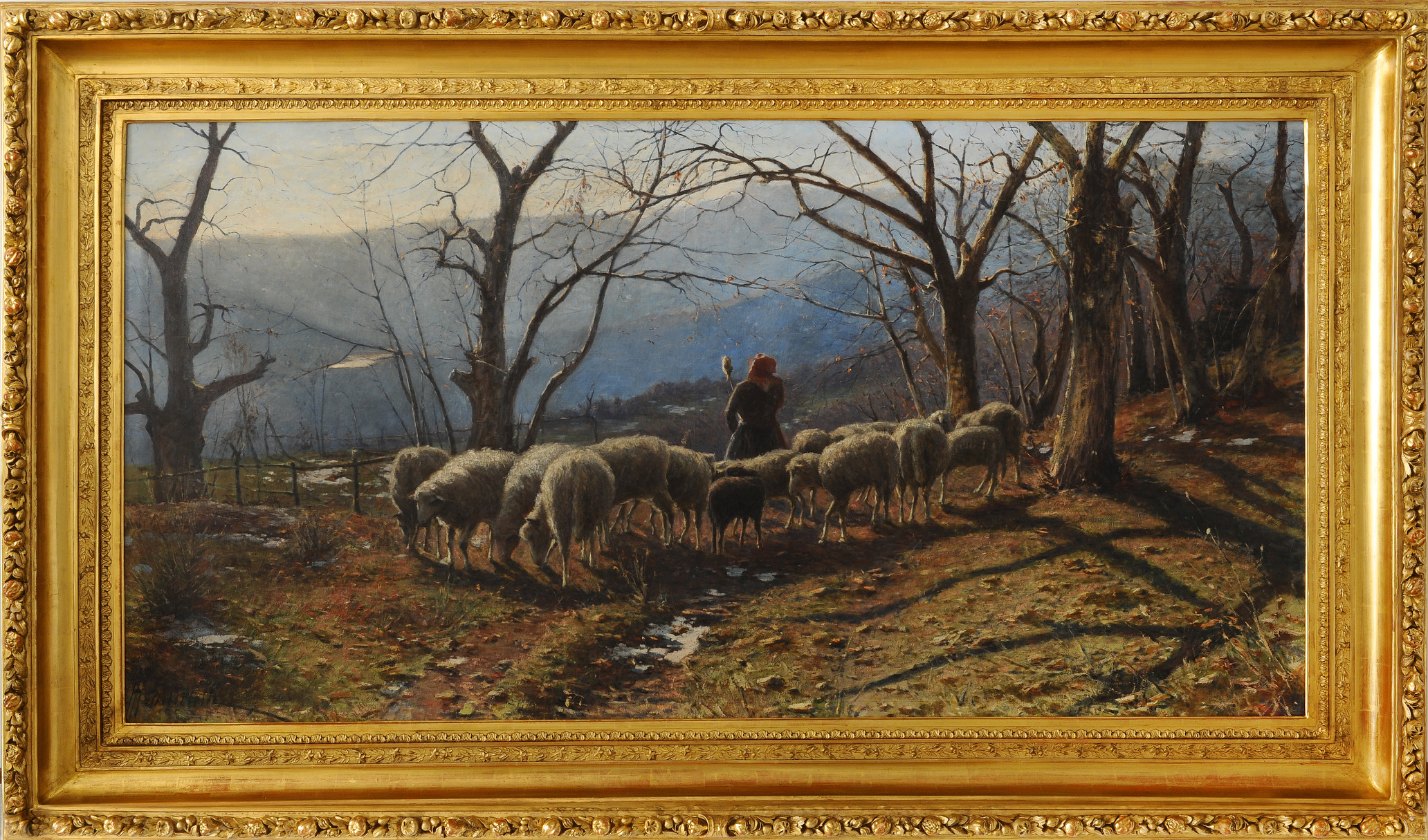 Achille Tominetti Paesaggio con Pecore